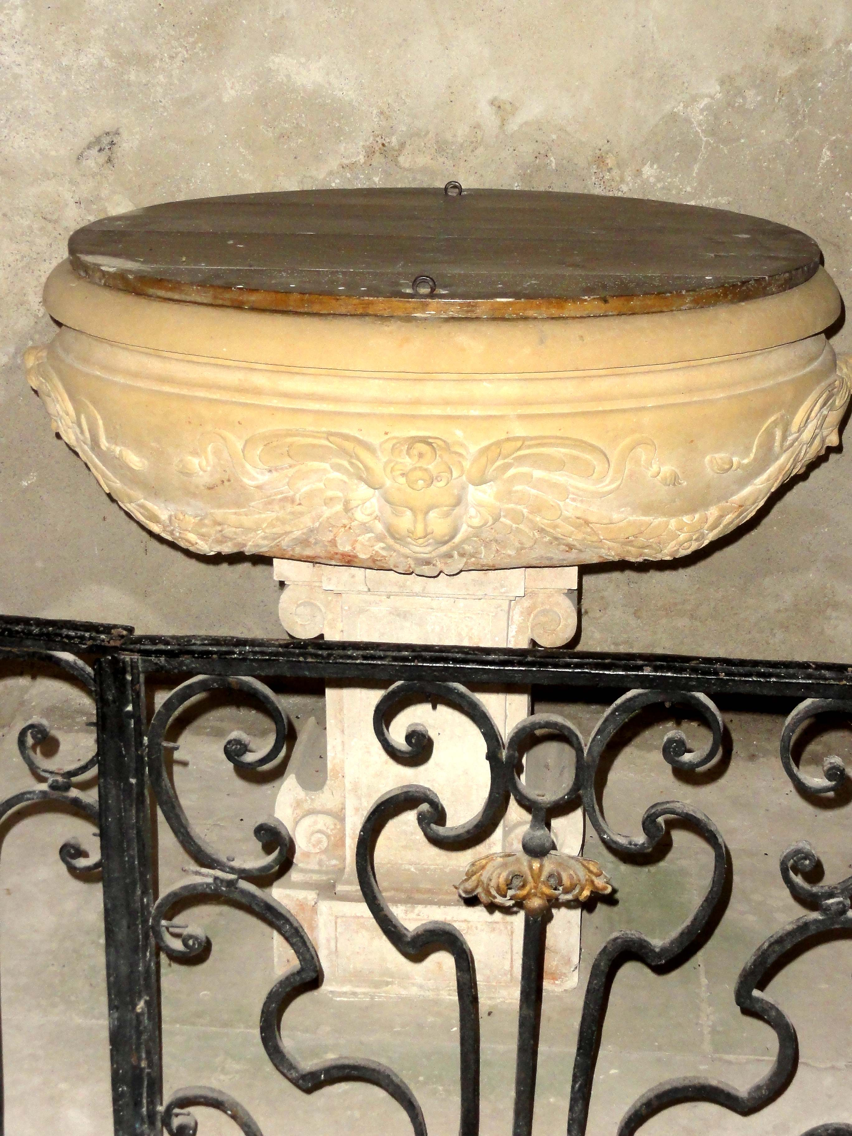 Mobilier de l'église (voir titre).